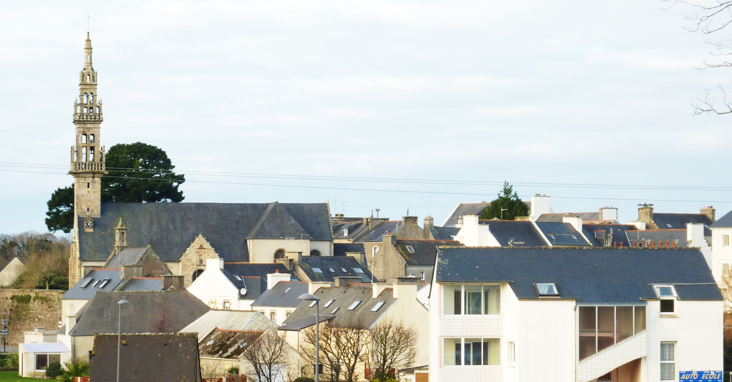 Bourg-Blanc : le bourg vu du cimetière